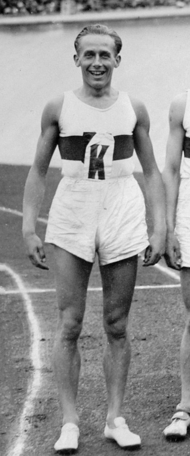 Sport. Olympische Spelen 1928 Amsterdam, Nederland : Harry Werner Storz.